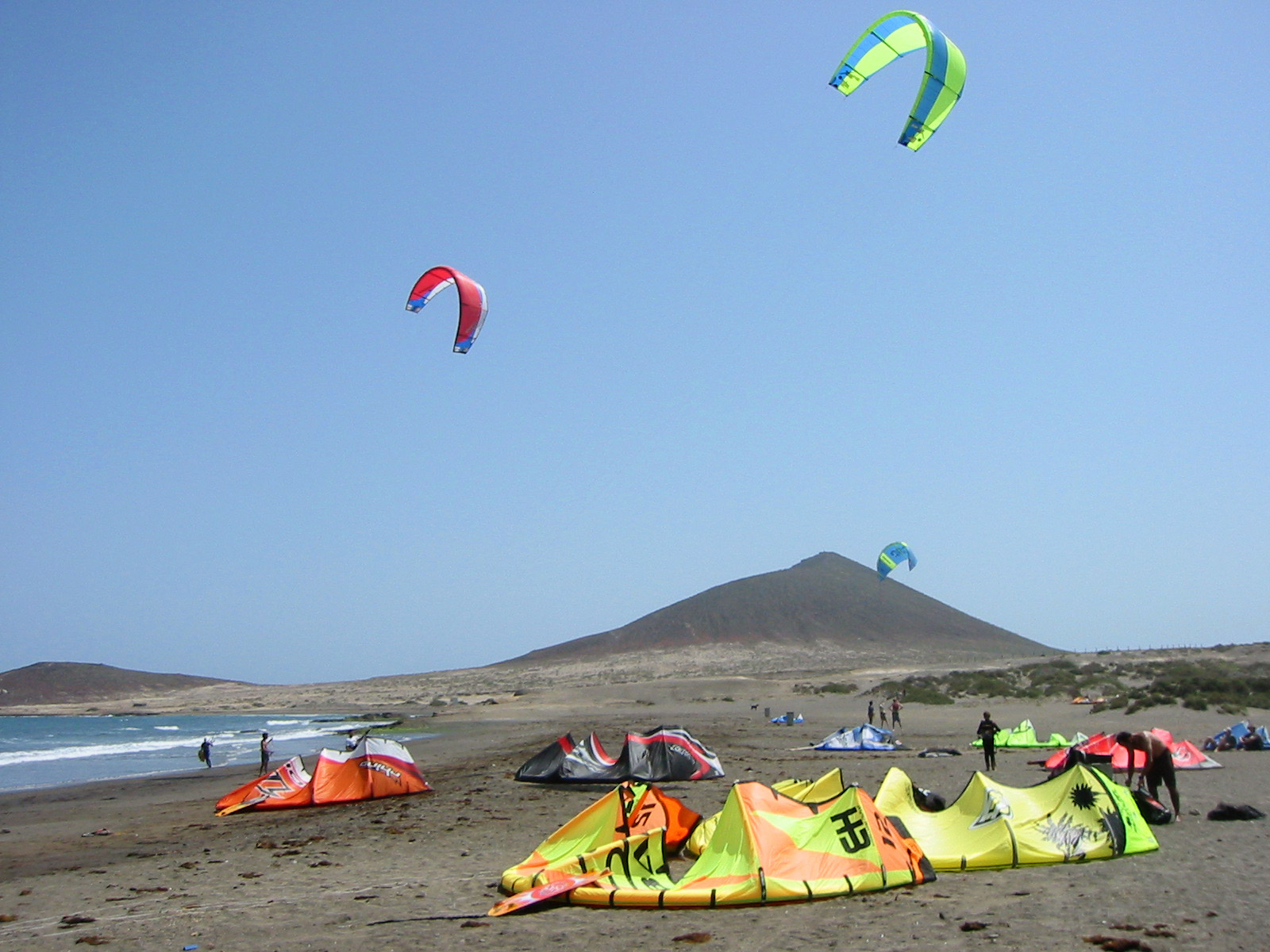 Kitesurfistas en El Médano, Tenerife.